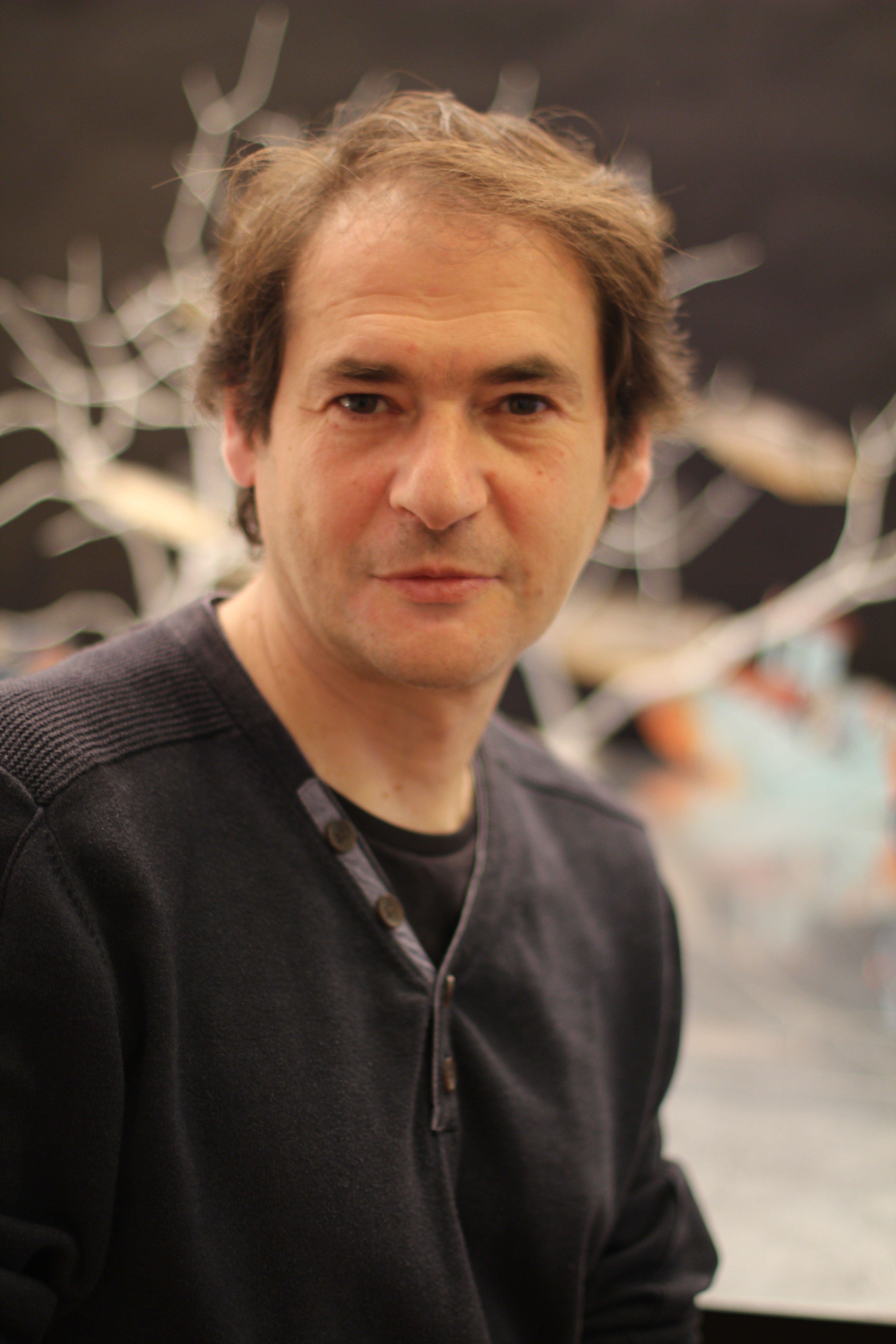 Viktor Naimark vor seinem Kunstwerk